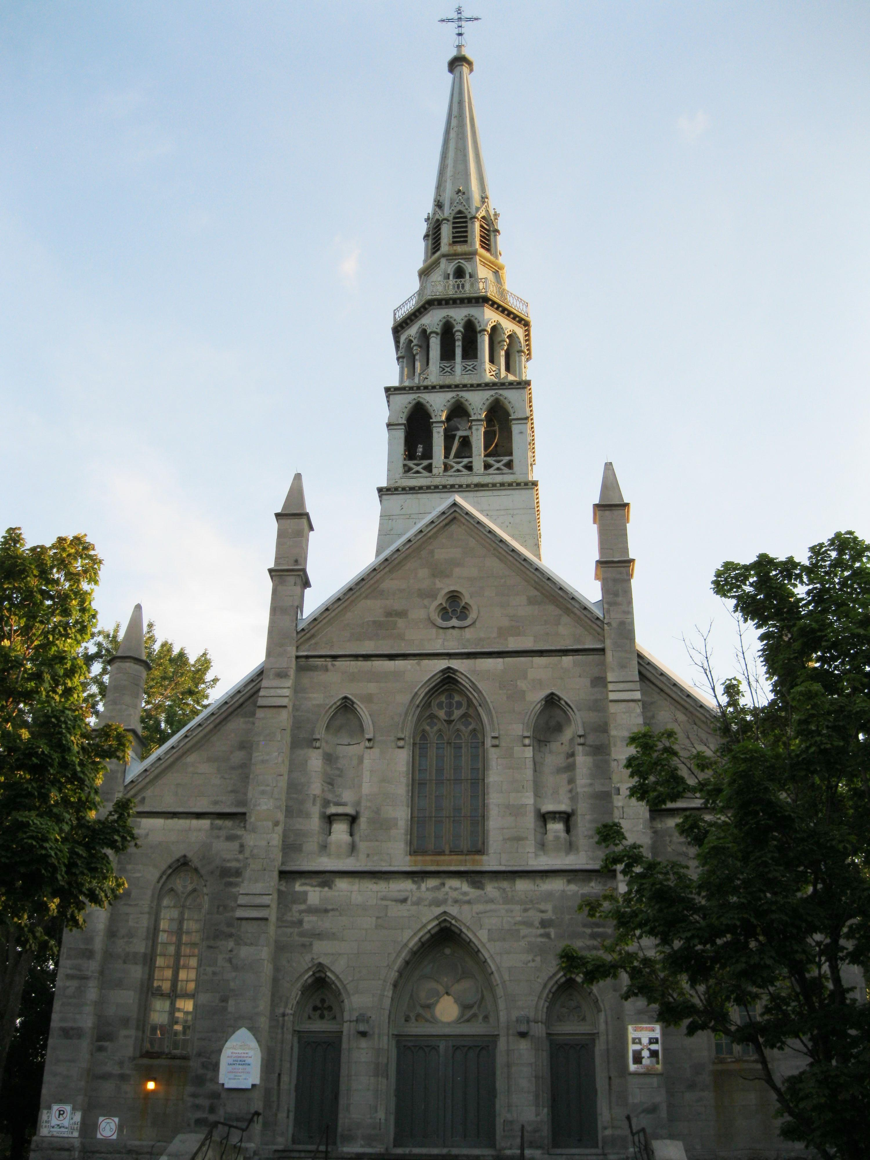 Église Saint-Joseph, 550, rue Richmond, Montréal